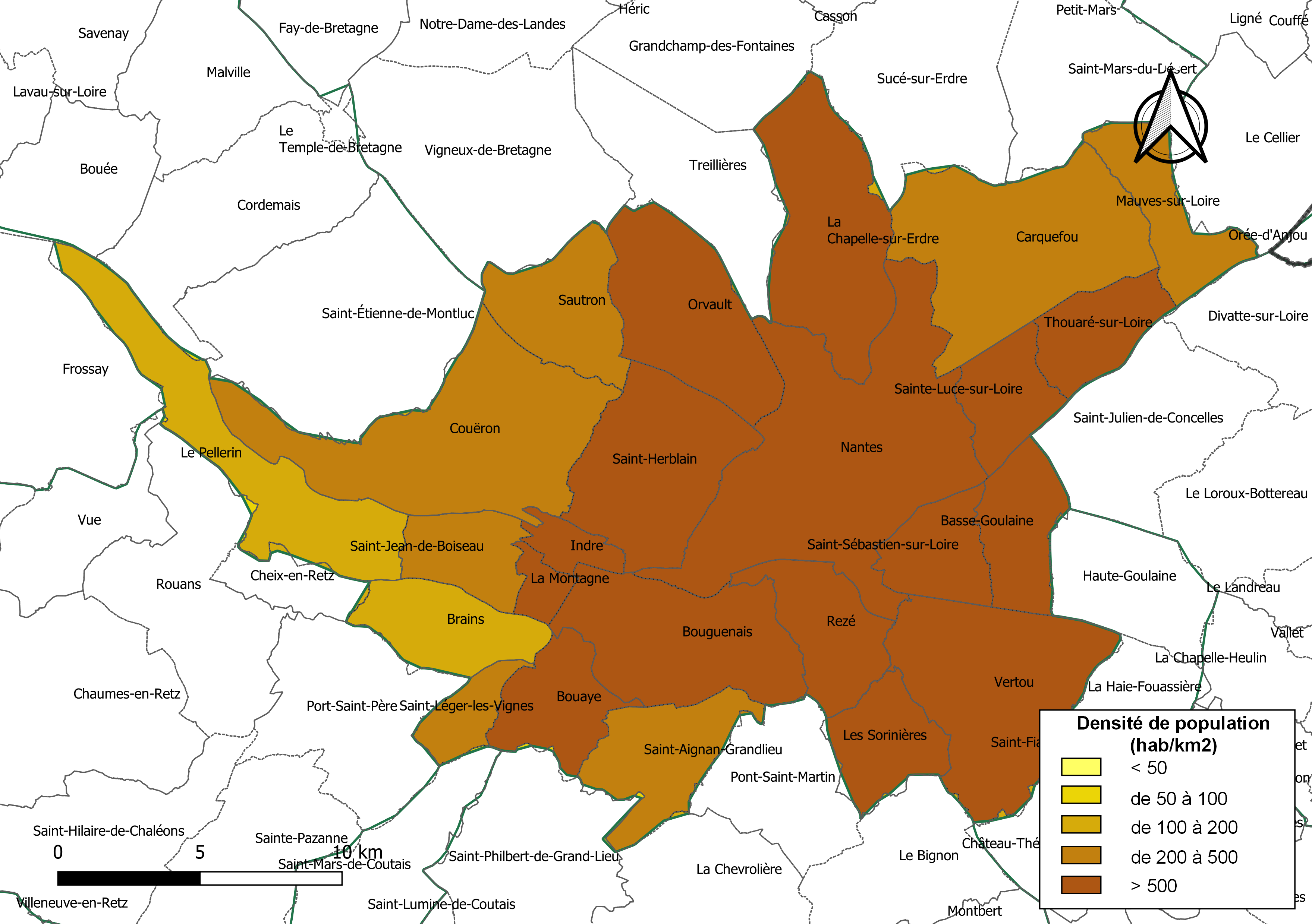 Carte des densités de population (millésimée 2016) des communes de l'intercommunalité Nantes Métropole, département de la Loire-Atlantique, France. Composition au 1er janvier 2019.